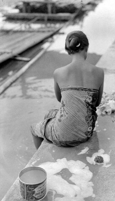 Negatief. Wassende vrouw aan de rivier, Batavia